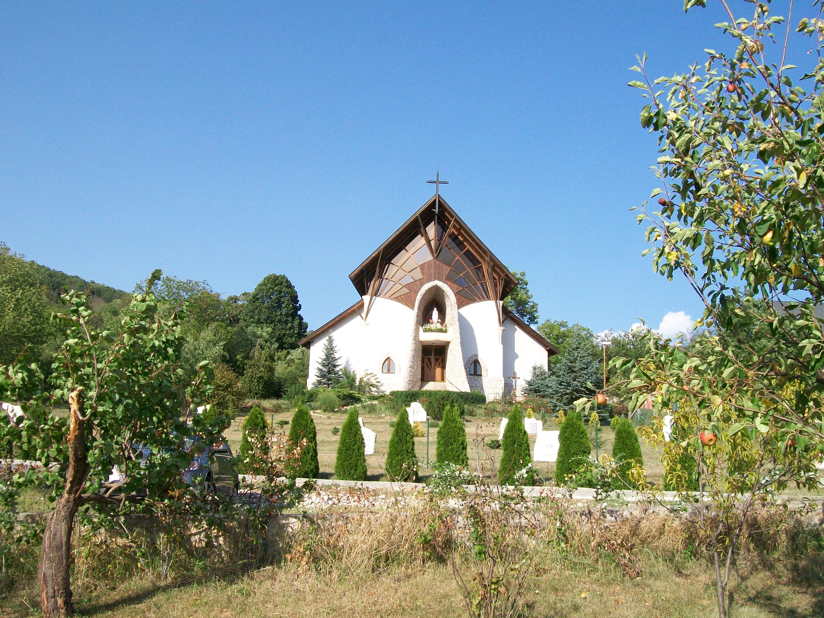 Lovinobaňa - rímskokatolícky kostol